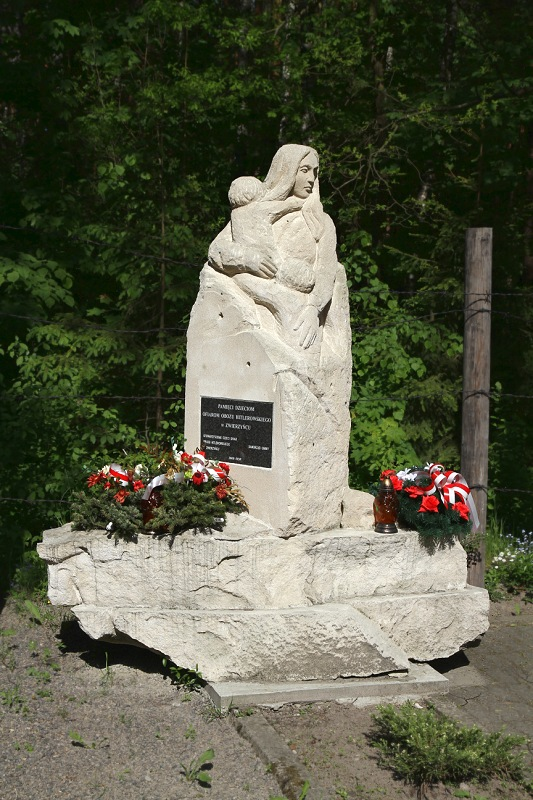 Le monument érigé en hommage aux enfants déportés de la région de Zamosc en 1942-43.